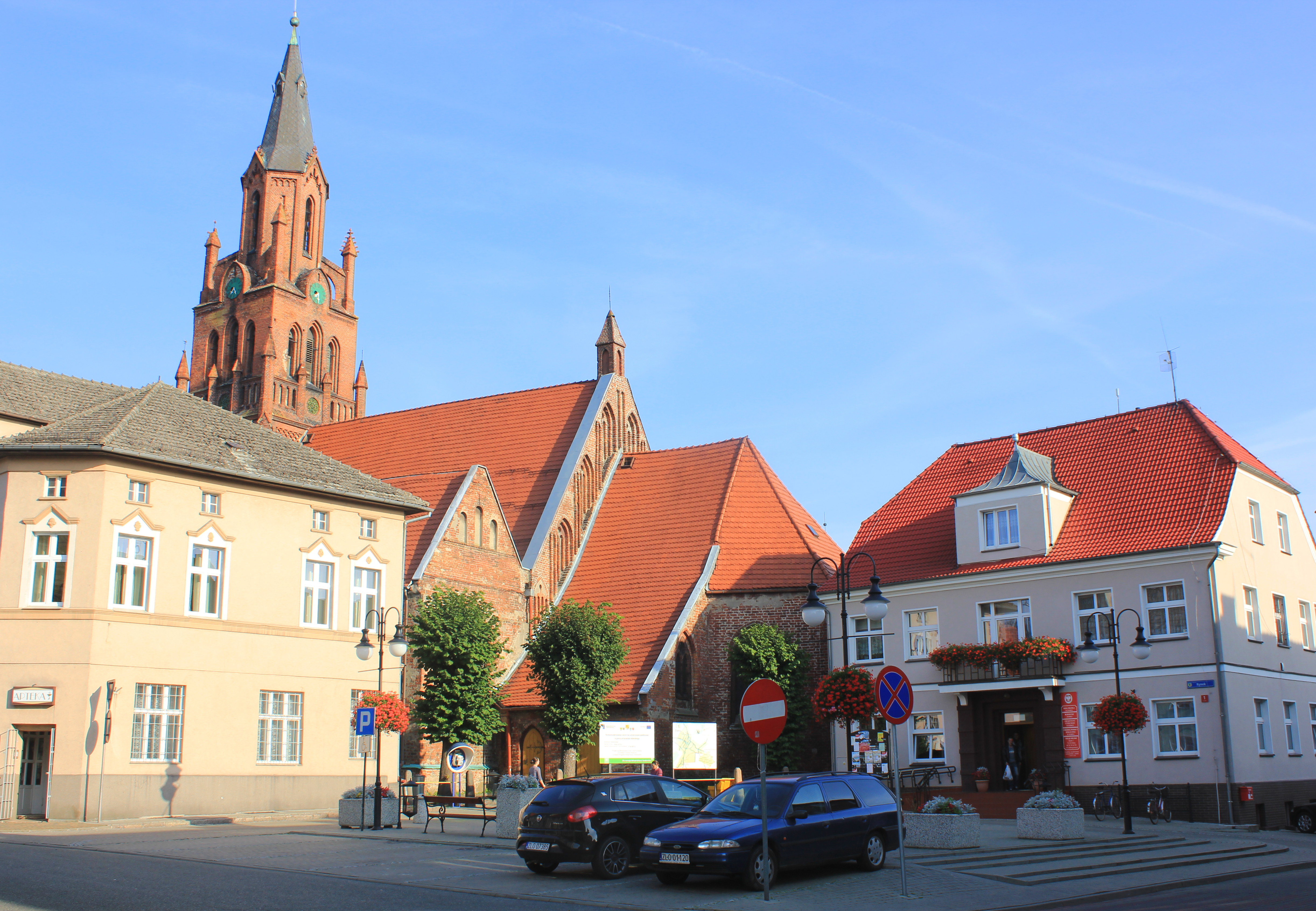 Dobra, teren Starego Miasta. Numer rejestru: 81 z 27.02.1956